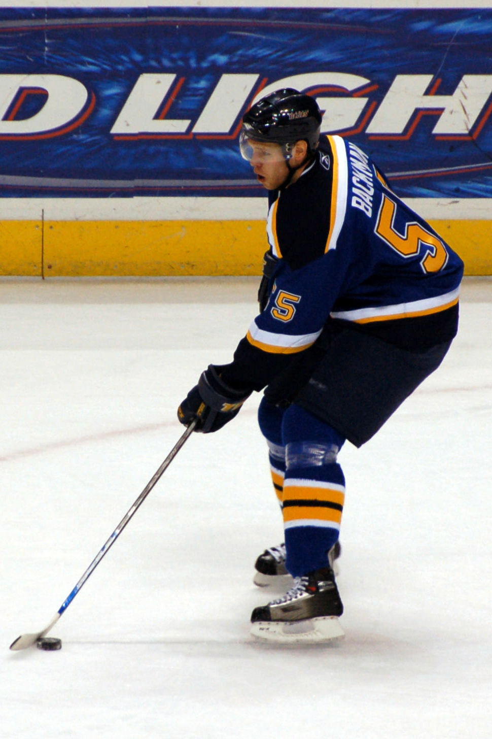 Christian Bäckman